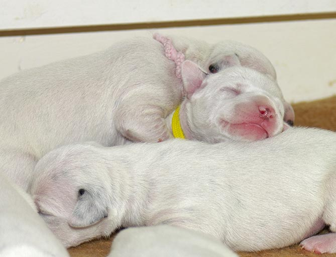 weiss geborene Dalmatinerwelpen